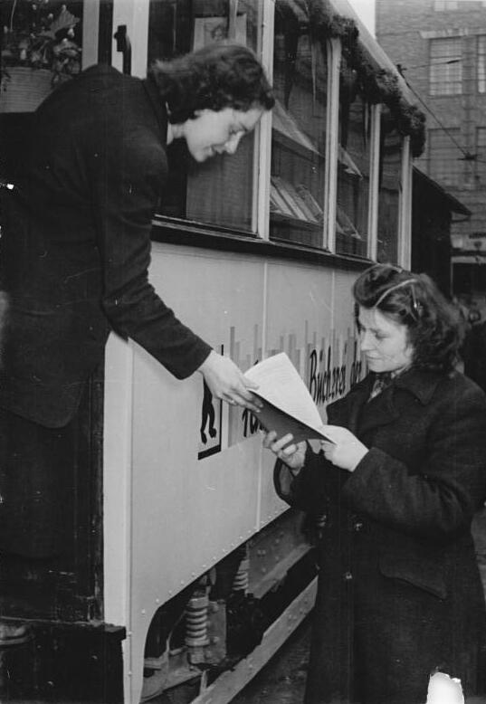 Berlin, mobiler Bibliothekswagen Zentralbild Schack 3.3.52. Die erste fahrbare Bücherei der BVG. Die Berliner Verkehrs-Gesellschaft stellte am 3.3.52 im Omnibus-Bahnhof Treptow ihren ersten fahrbaren Büchereiwagen in den Dienst. Diese Bücherei enthält ungefähr 2.200 Bände Fachliteratur, politische Bücher, erzählende und allgemeinbildende Literatur. UBz: Zwei Schaffnerinnen, die sich für Fachliteratur interessieren, links Dorothee Paul, rechts Gertrud Zabrocki. Leihweise Zentral Bild